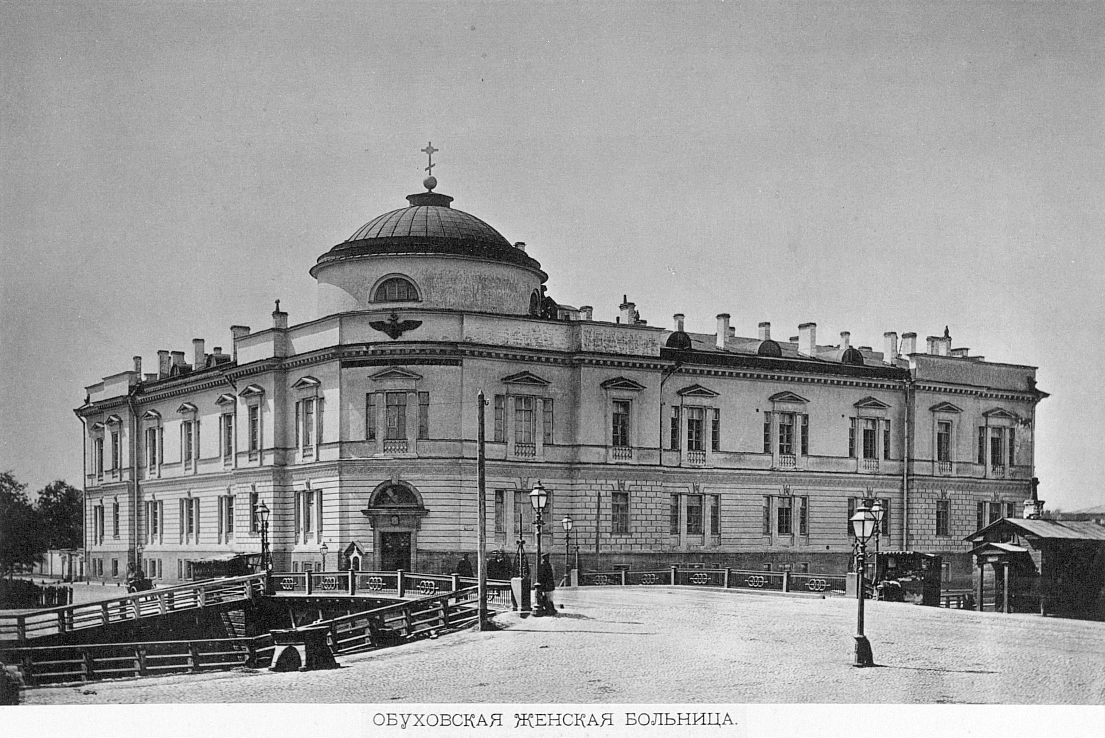 Обуховская женская больница и Введенский мост, 1870-е годы